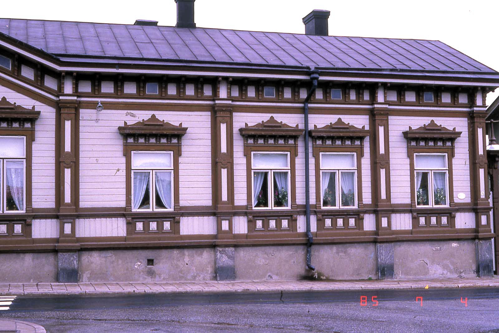 Marelan talo Raumalla vuonna 1985